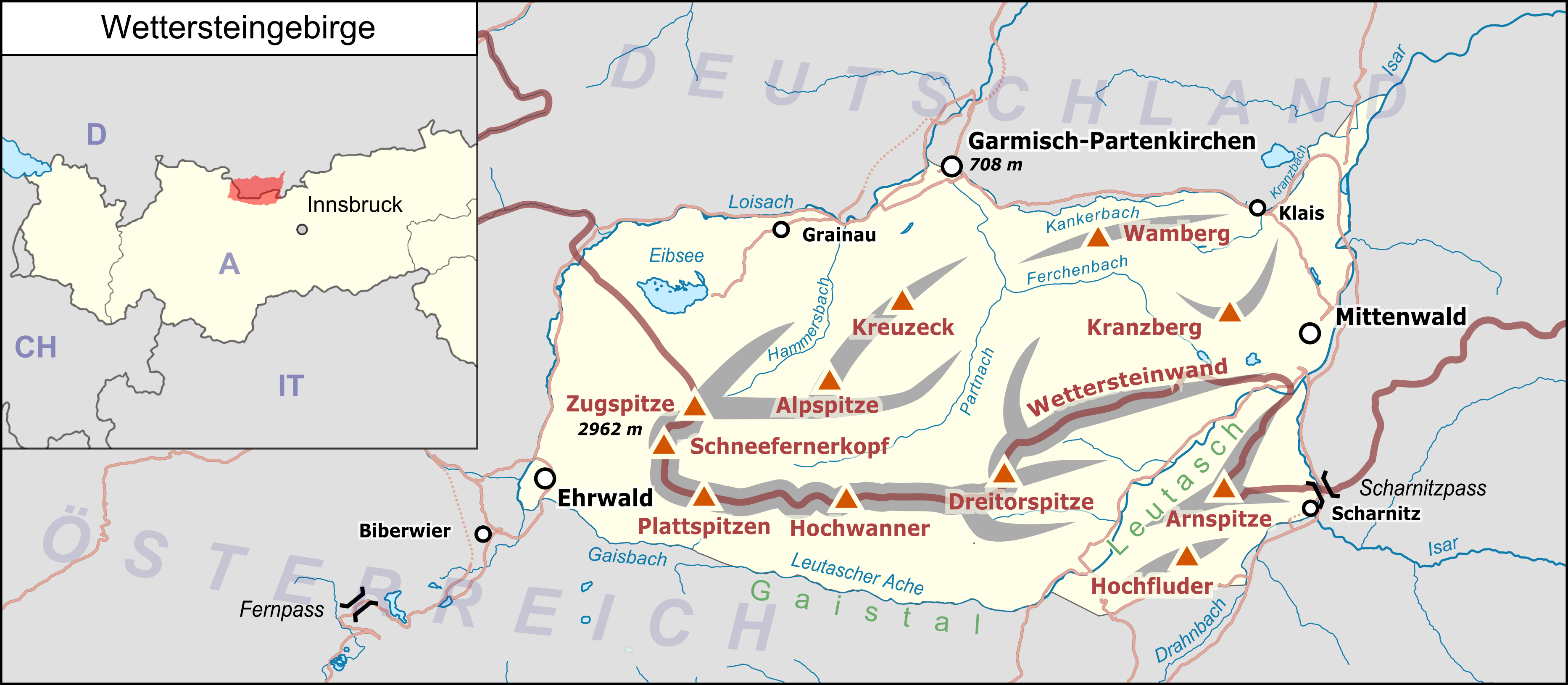 Übersichtskarte des Wettersteingebirges